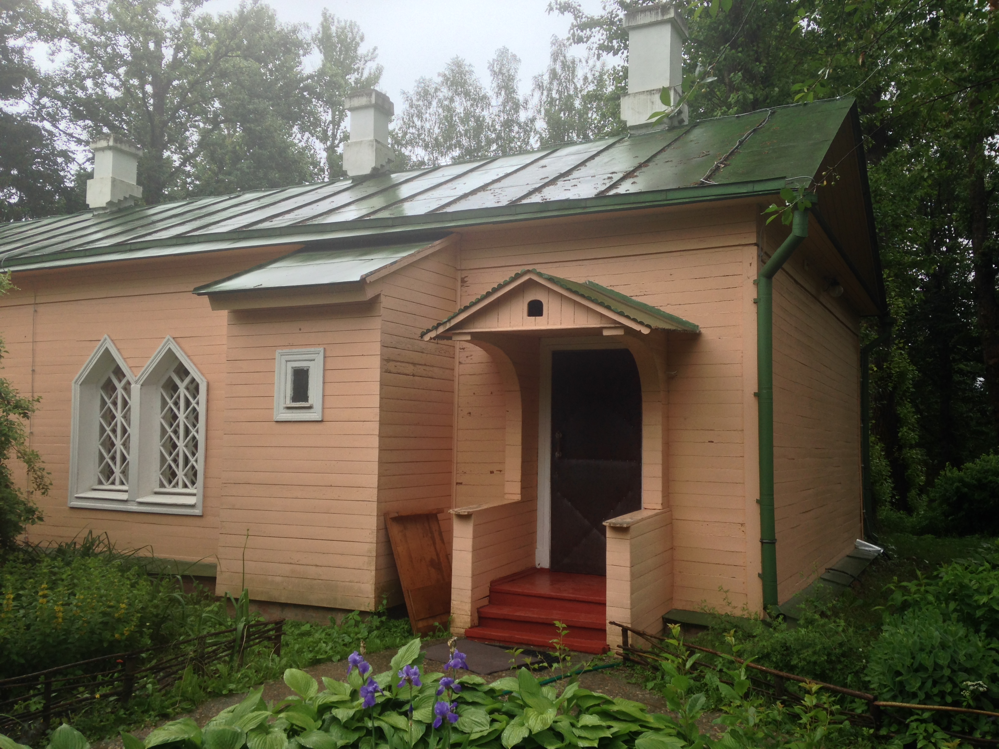 Дом А. П. Чехова, в котором он жил в 1892-1898 гг (мемориальный музей): Мелихово, Чеховский район, Московская область